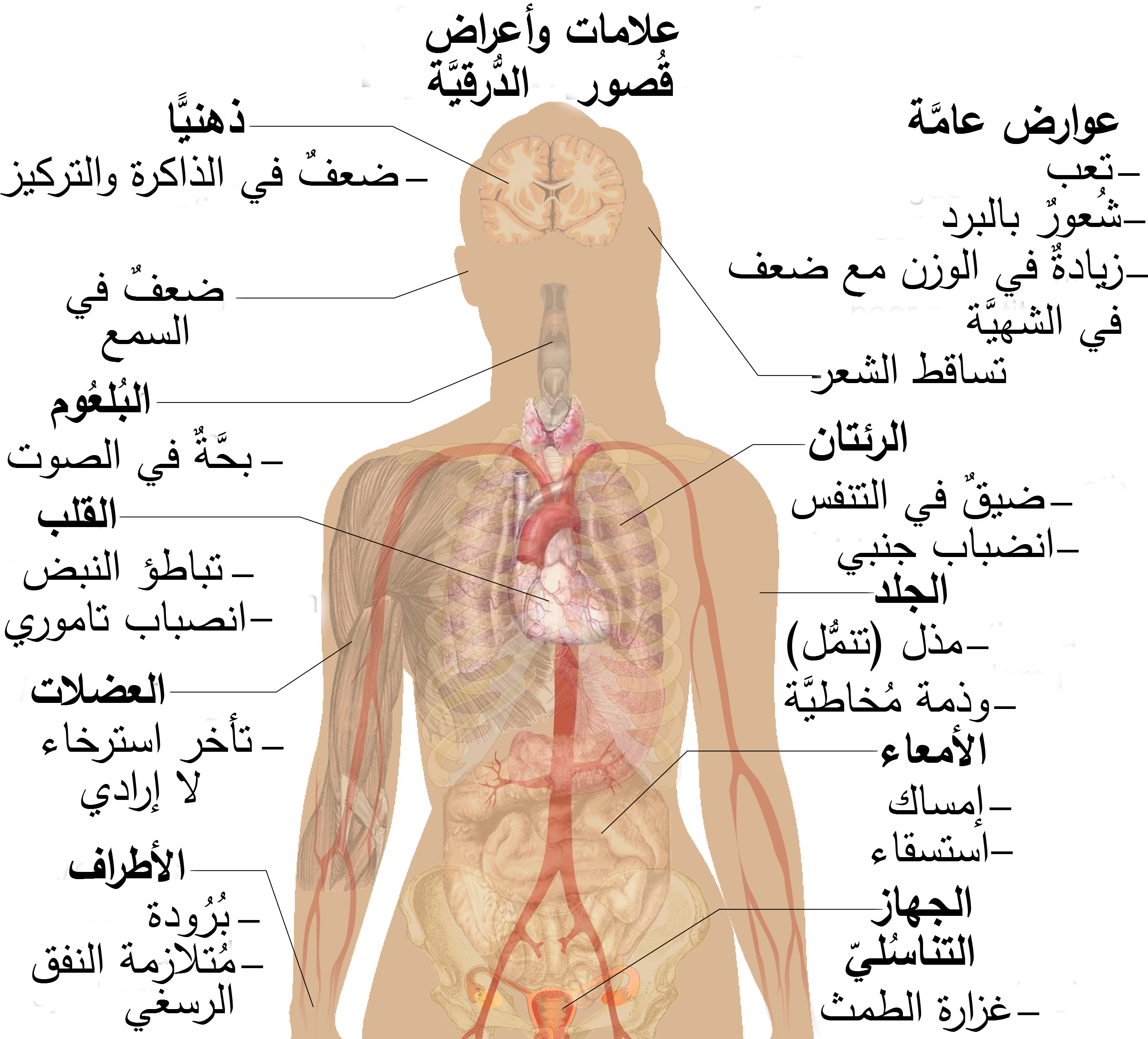 علامات وأعراض قُصور الدُرقيَّة.